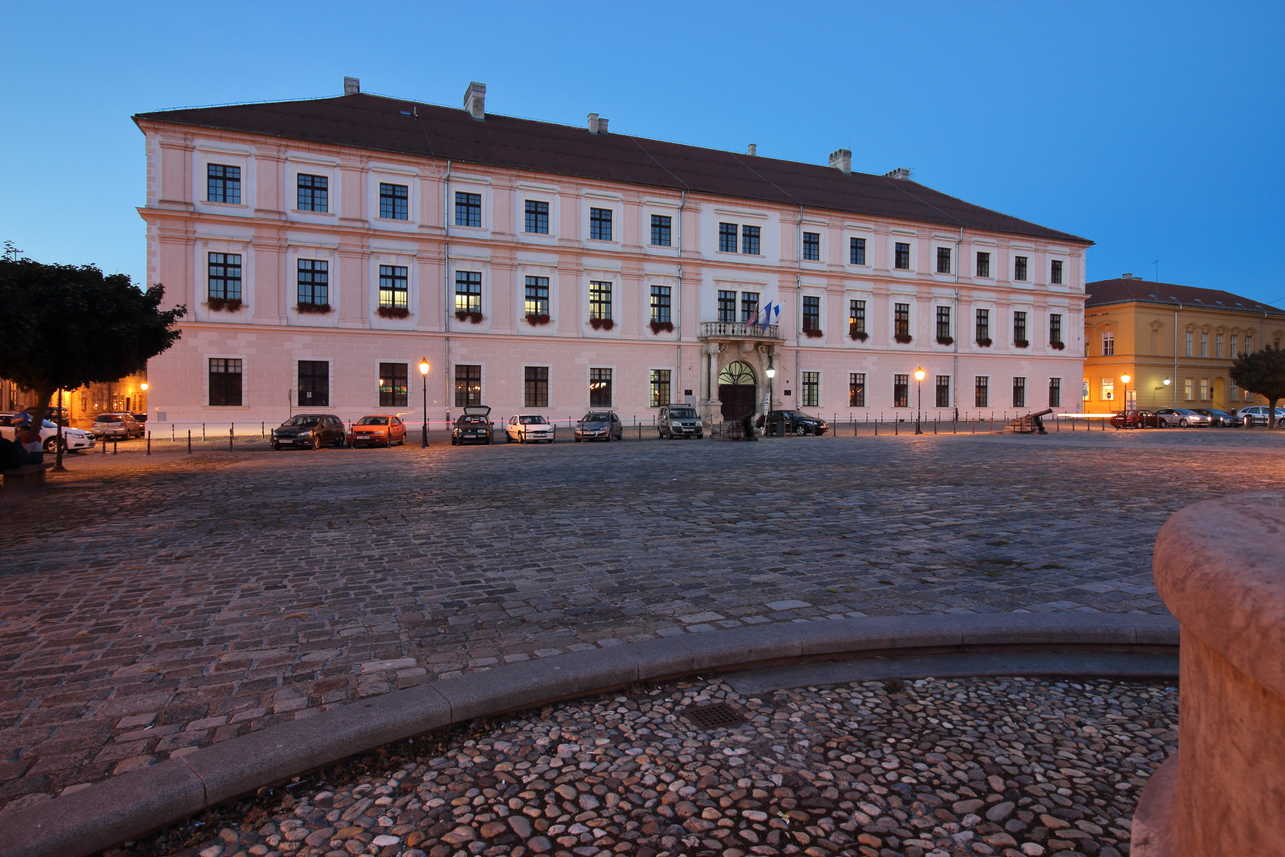 Zgrada Generalkomande, Trg sv. Trojstva 3